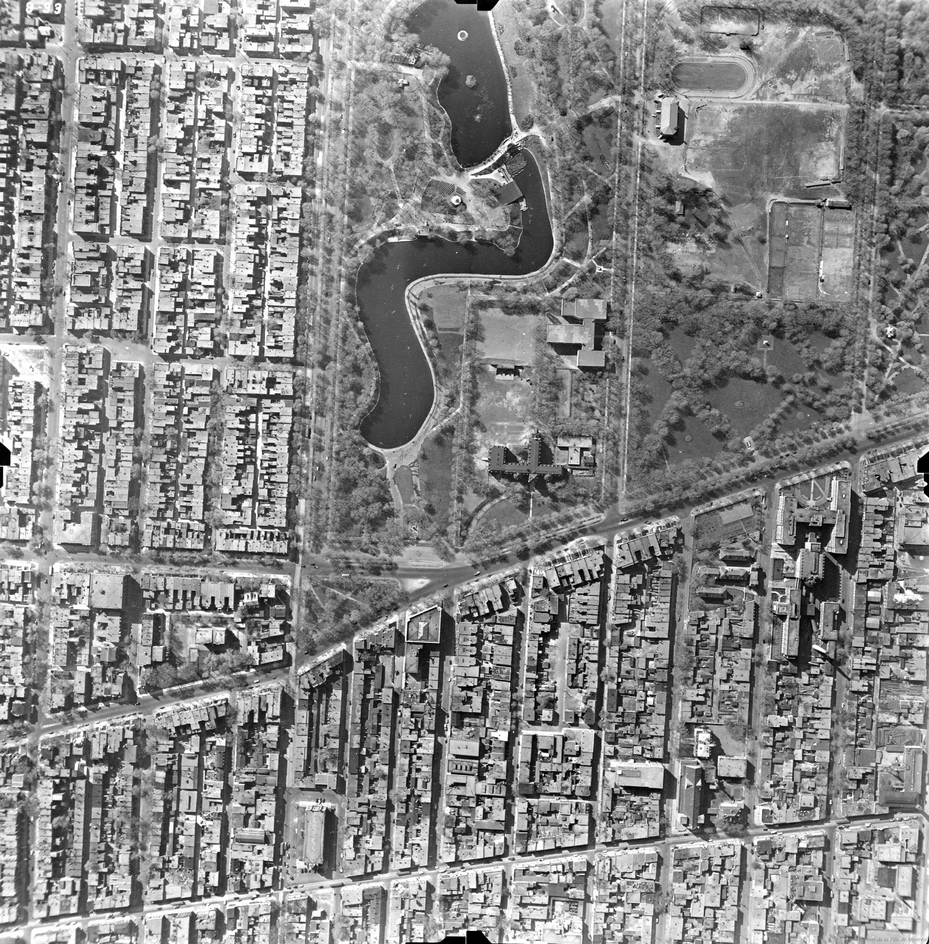 Photographie aérienne de Montréal : parc La Fontaine